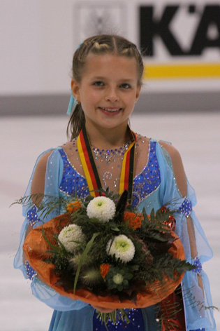 Polina Agafonova (RUS) at the 2009-2010 JGP Pokal der Blauen Schwerter.